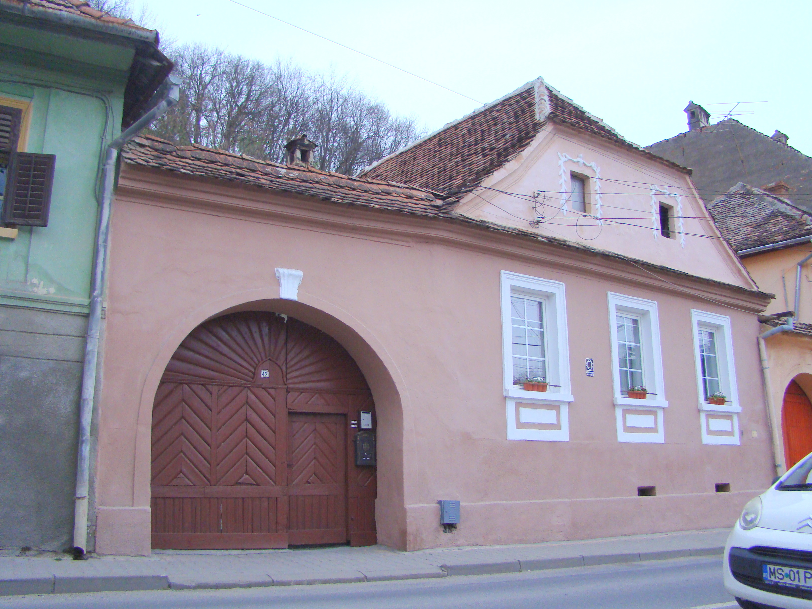 Casă, municipiul Sighișoara, str. Chendi Ilarie 42 sf. sec. XVIII-înc. sec. XIX